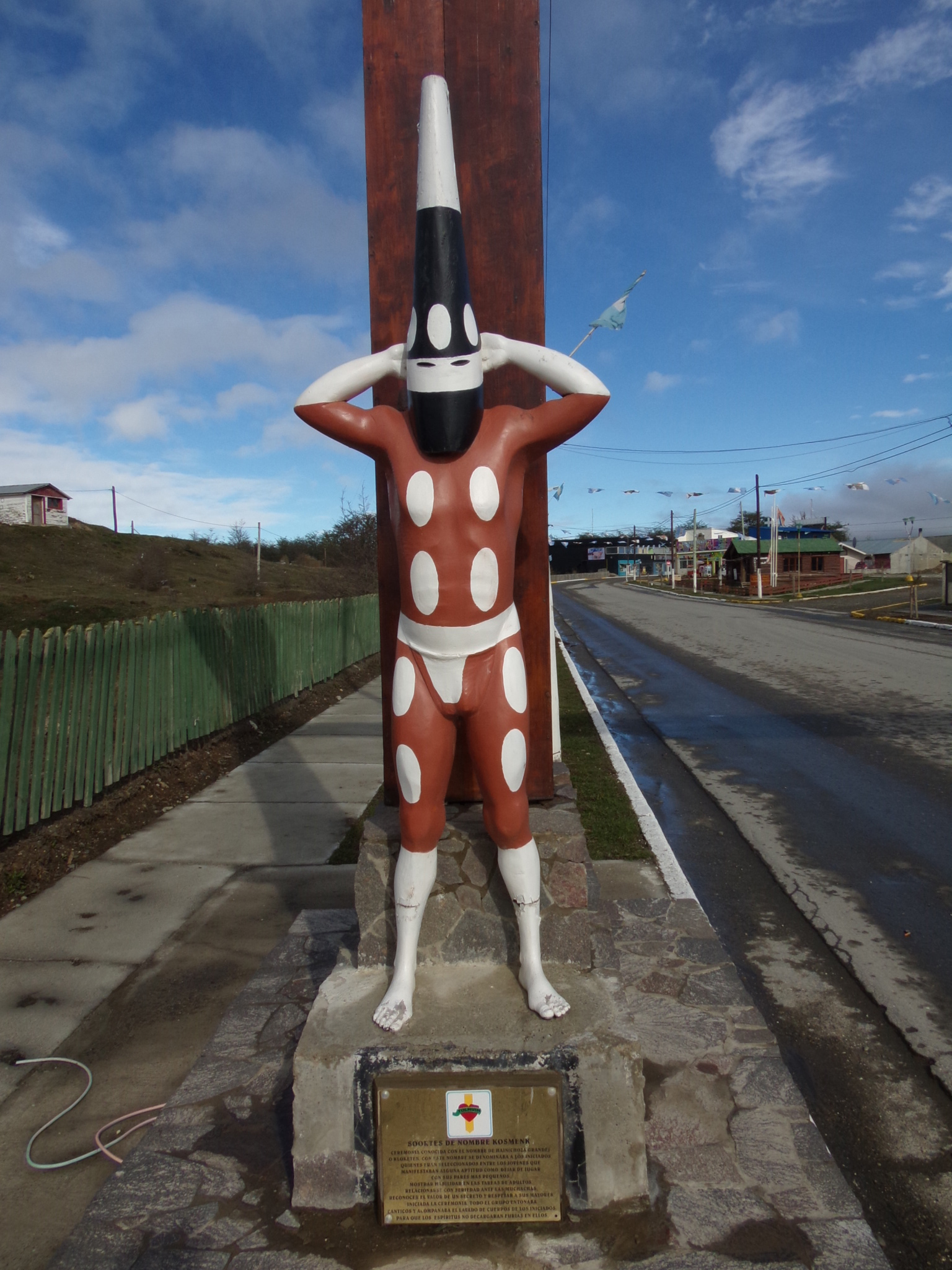 Representación Selknam, ubicada en la localidad de Tolhuin, Tierra del Fuego.